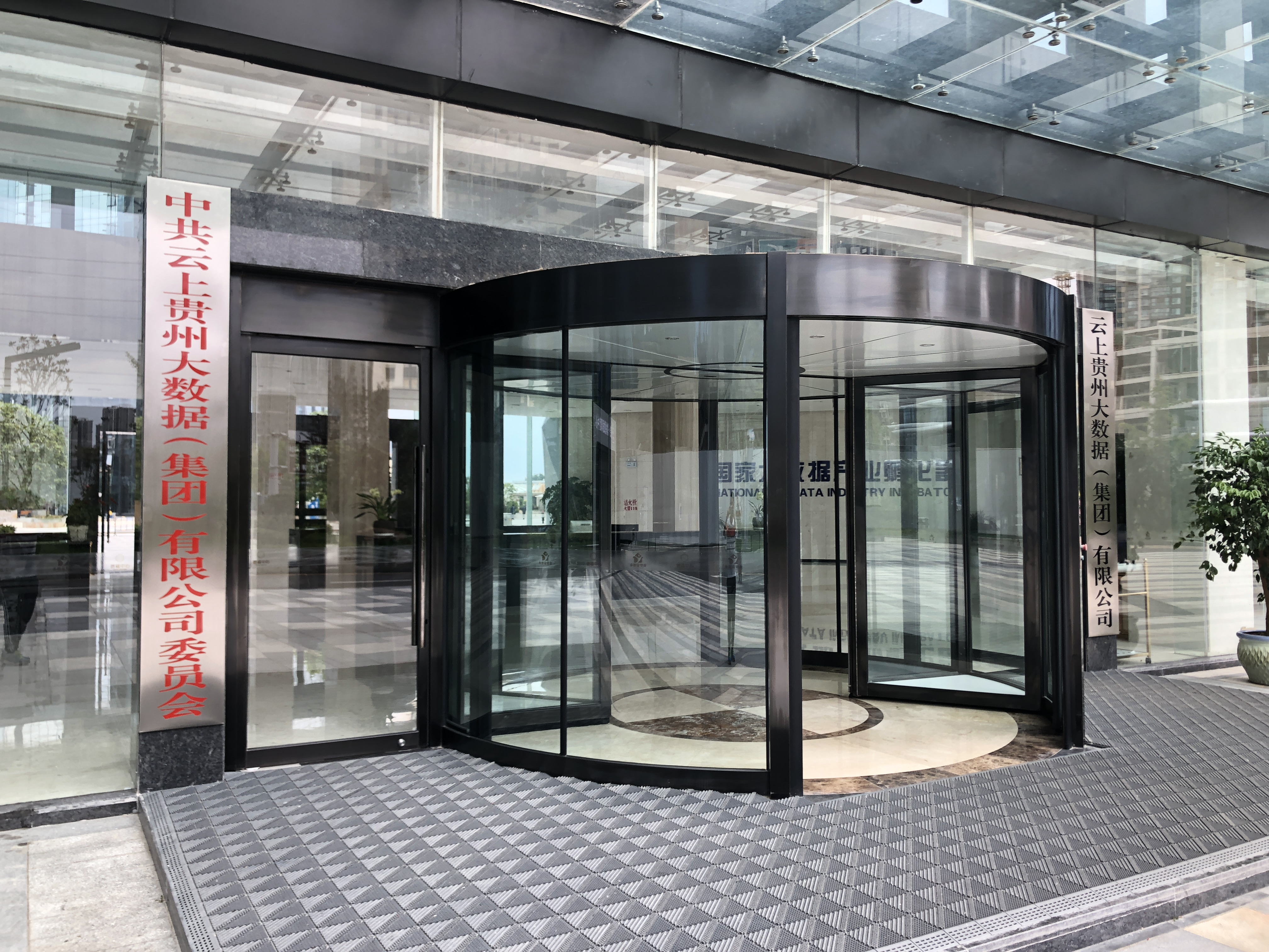 中文（中国大陆）: iCloud（中国）背后的云上贵州大数据